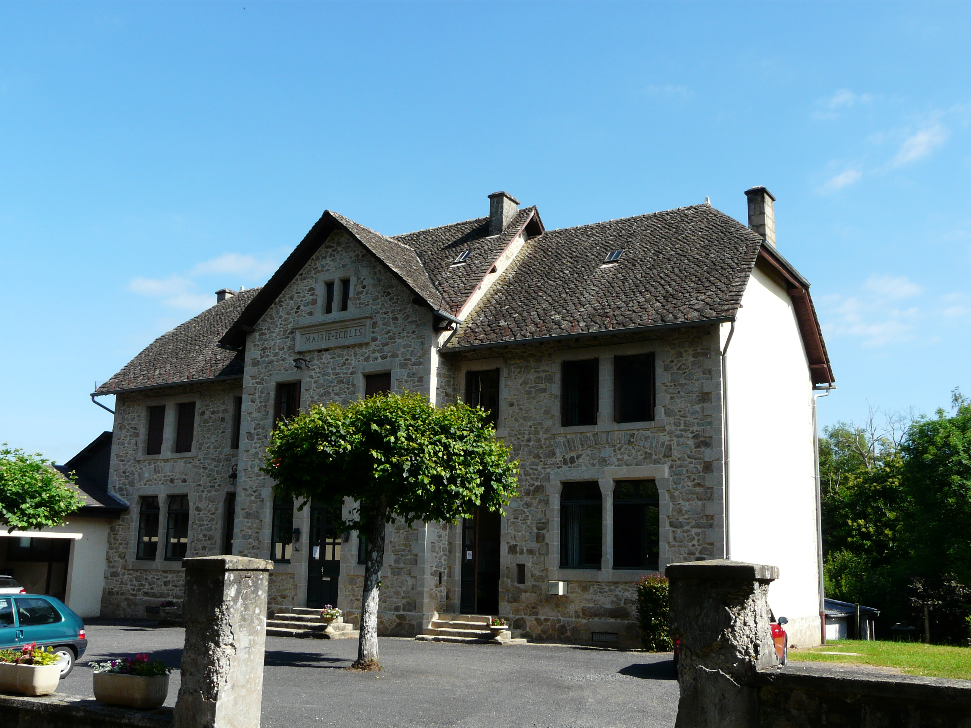 La mairie de Saint-Geniez-ô-Merle, Corrèze, France.